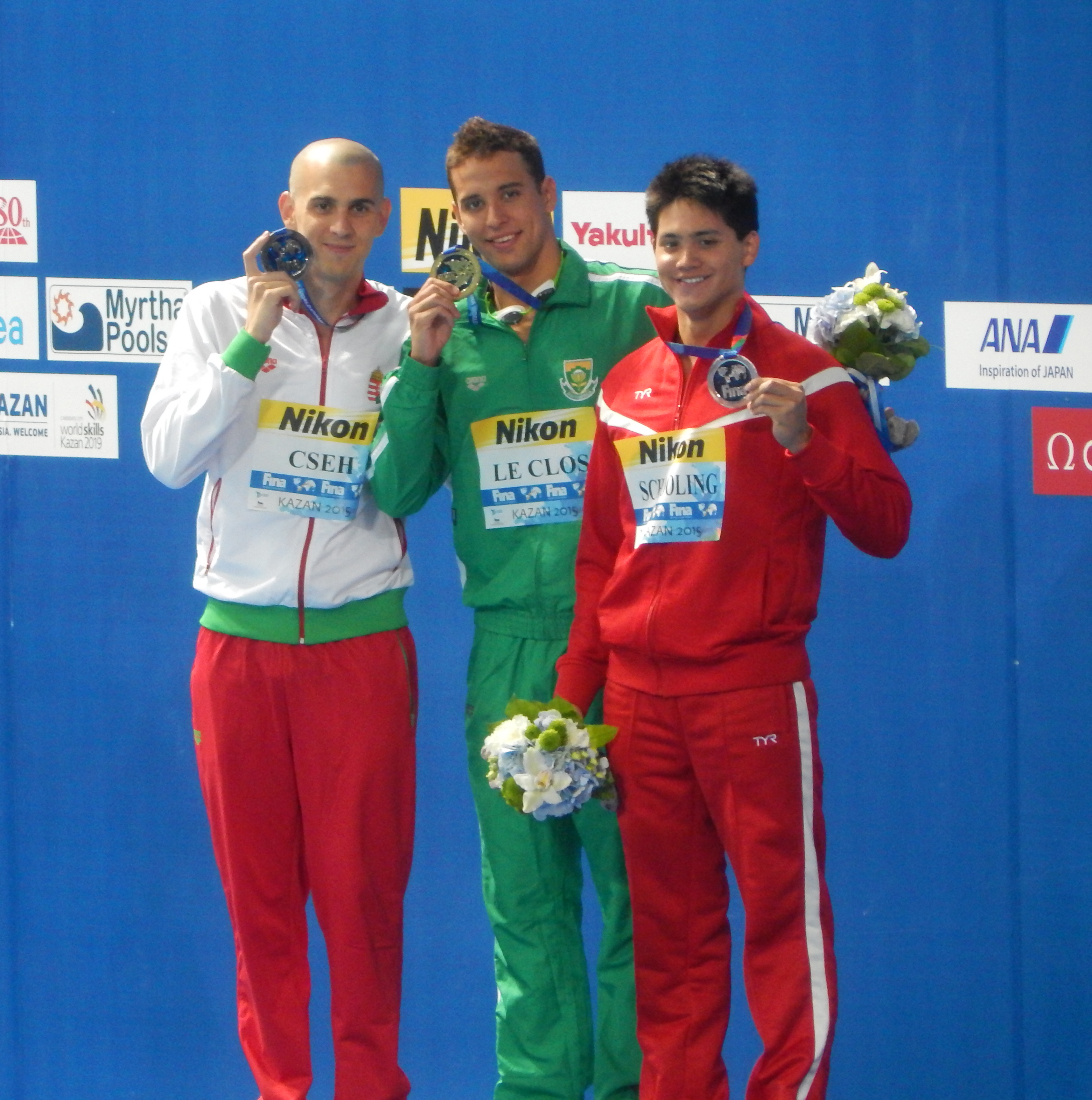 Церемония награждения призёров в плавании на 100 метров баттерфляем на чемпионате мира в Казани